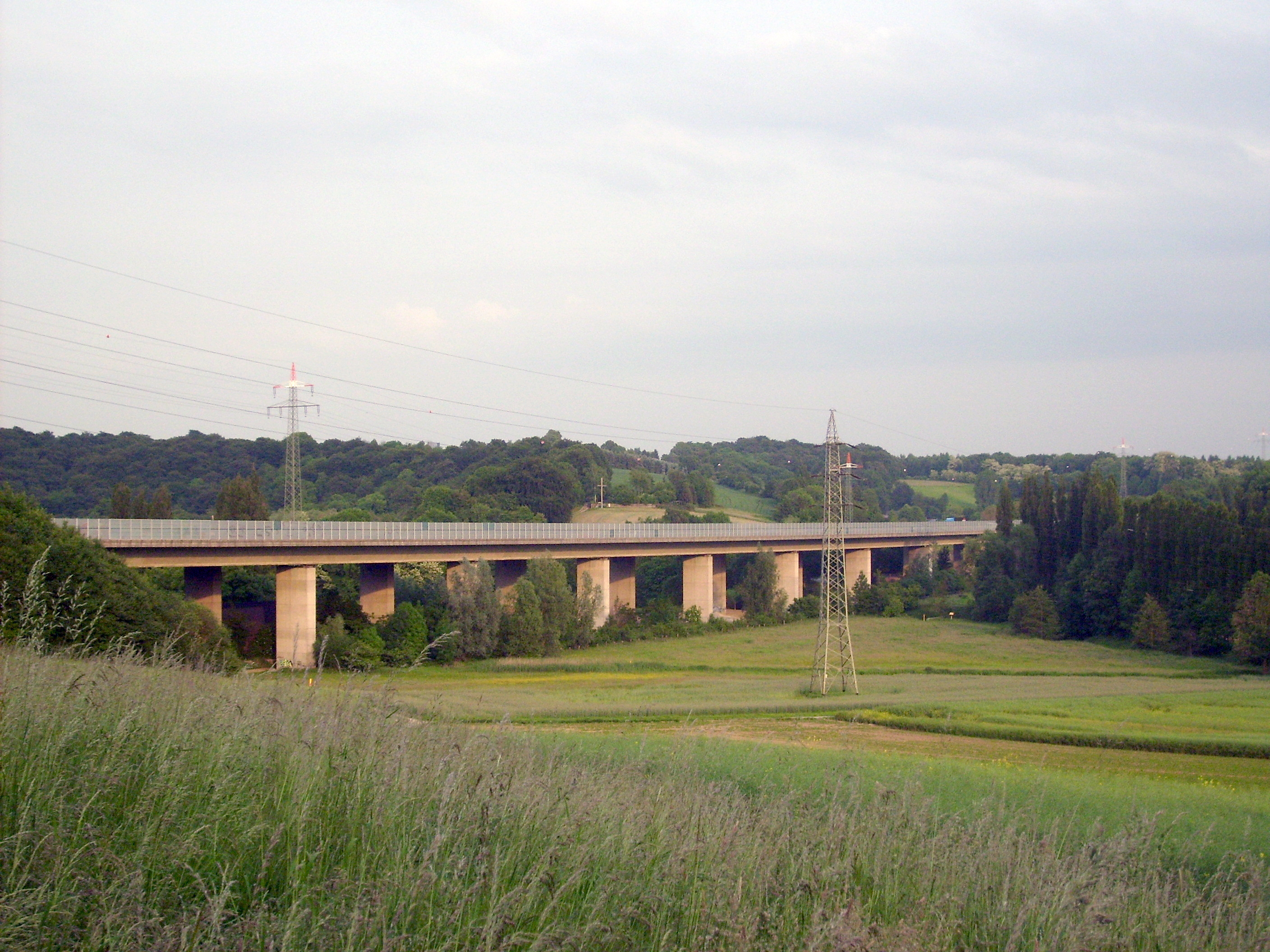 Die Neandertalbrücke in Erkrath im Mai 2009